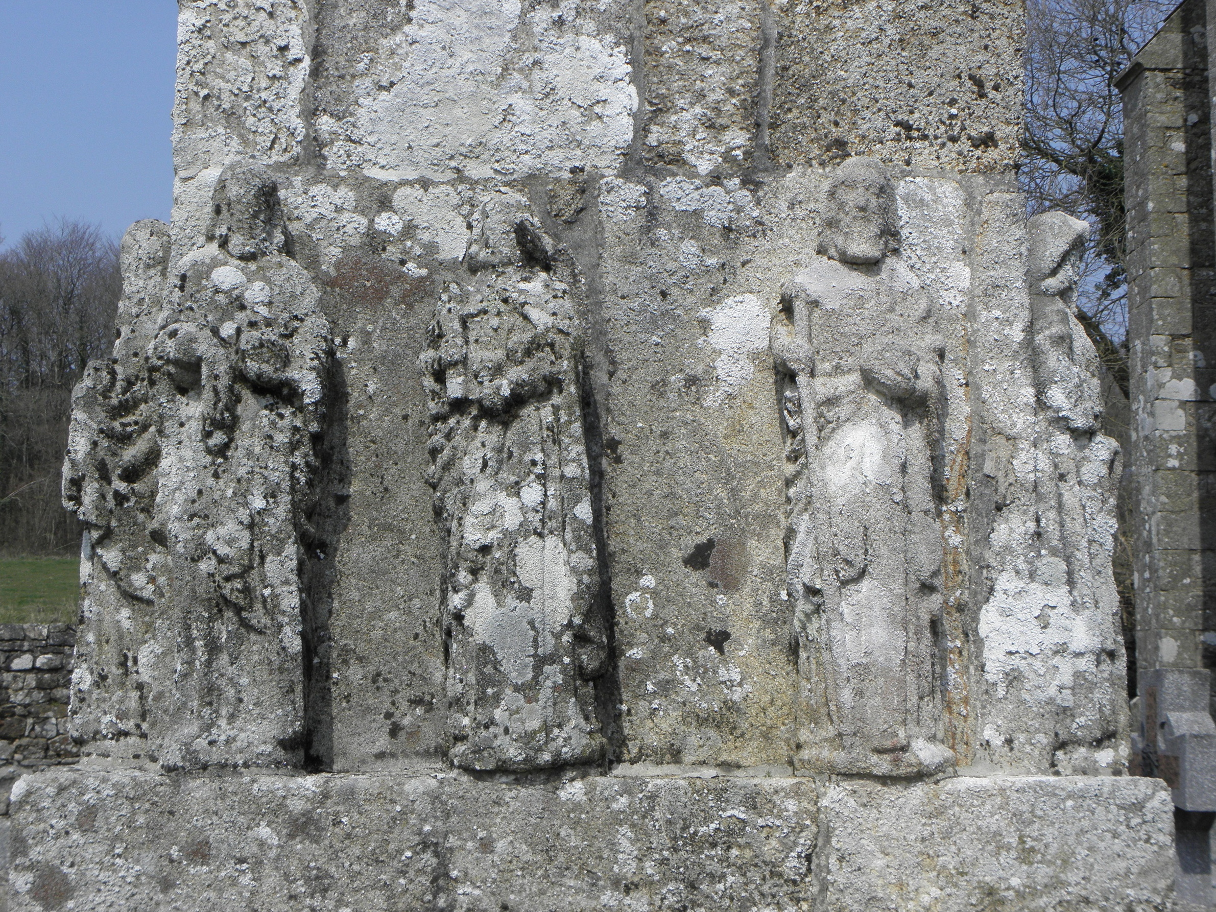 Croix du cimetière de Saint-Adrien (22). Face sud.